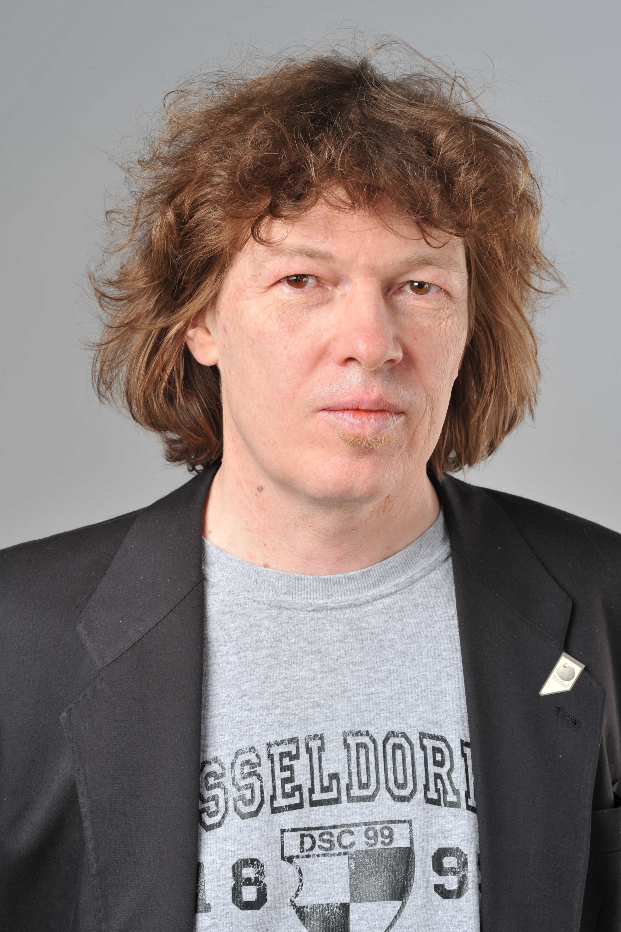 Kai Metzger